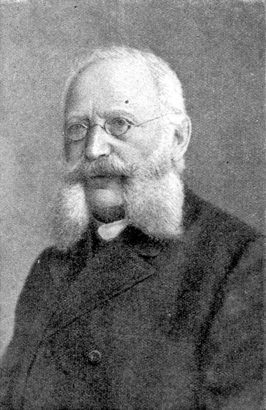 Apotheker Siegfried Mühsam